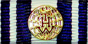 Bandschnalle des Einsatzzeichen für Humanitäre Hilfe im Ausland des Technischen Hilfswerks